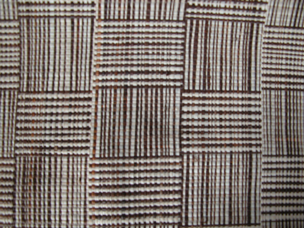 foto mia personale, tessuto tela lavorato a blocchi,2007 Licensing Categoria:Immagini sulla tessitura